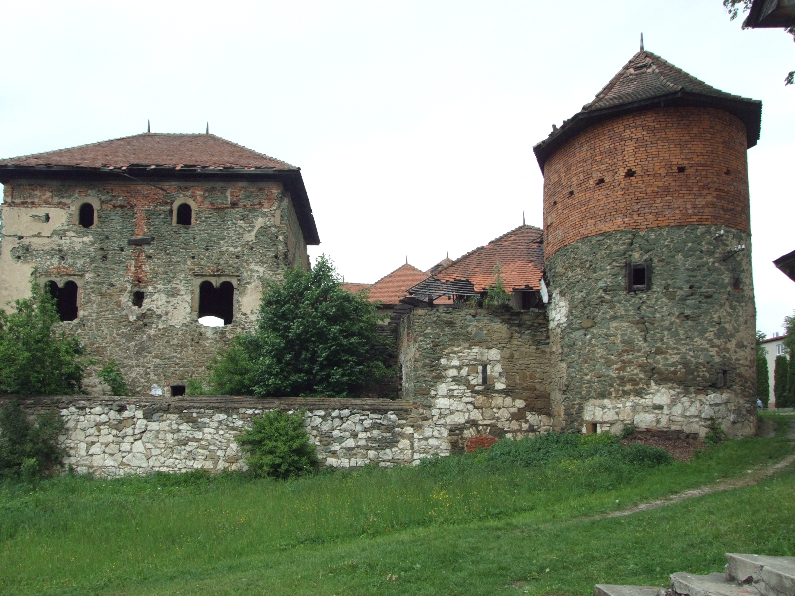 Markušovský zámok, 2.pol.13.st.